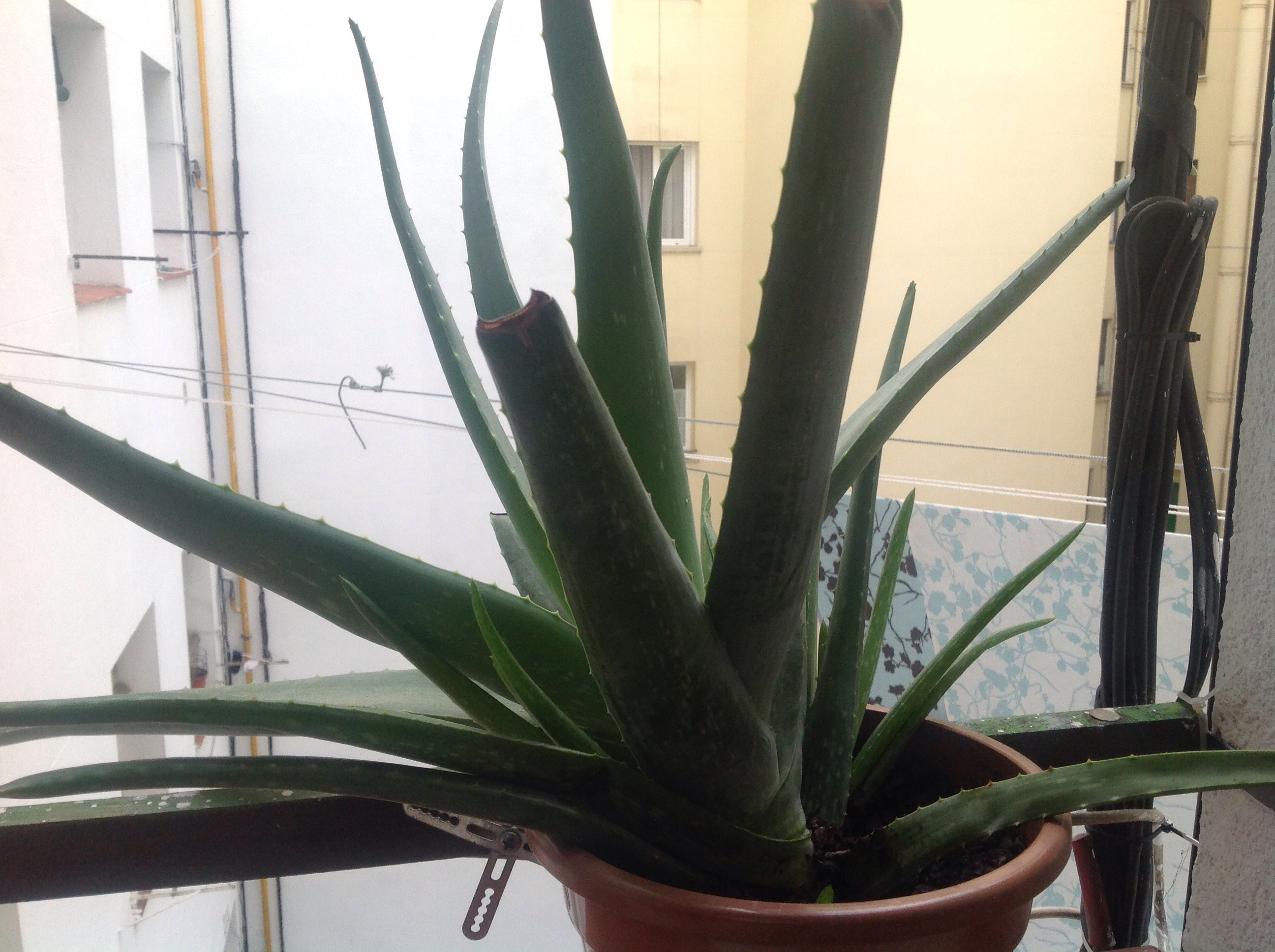 planta de aloe vera de 5 años